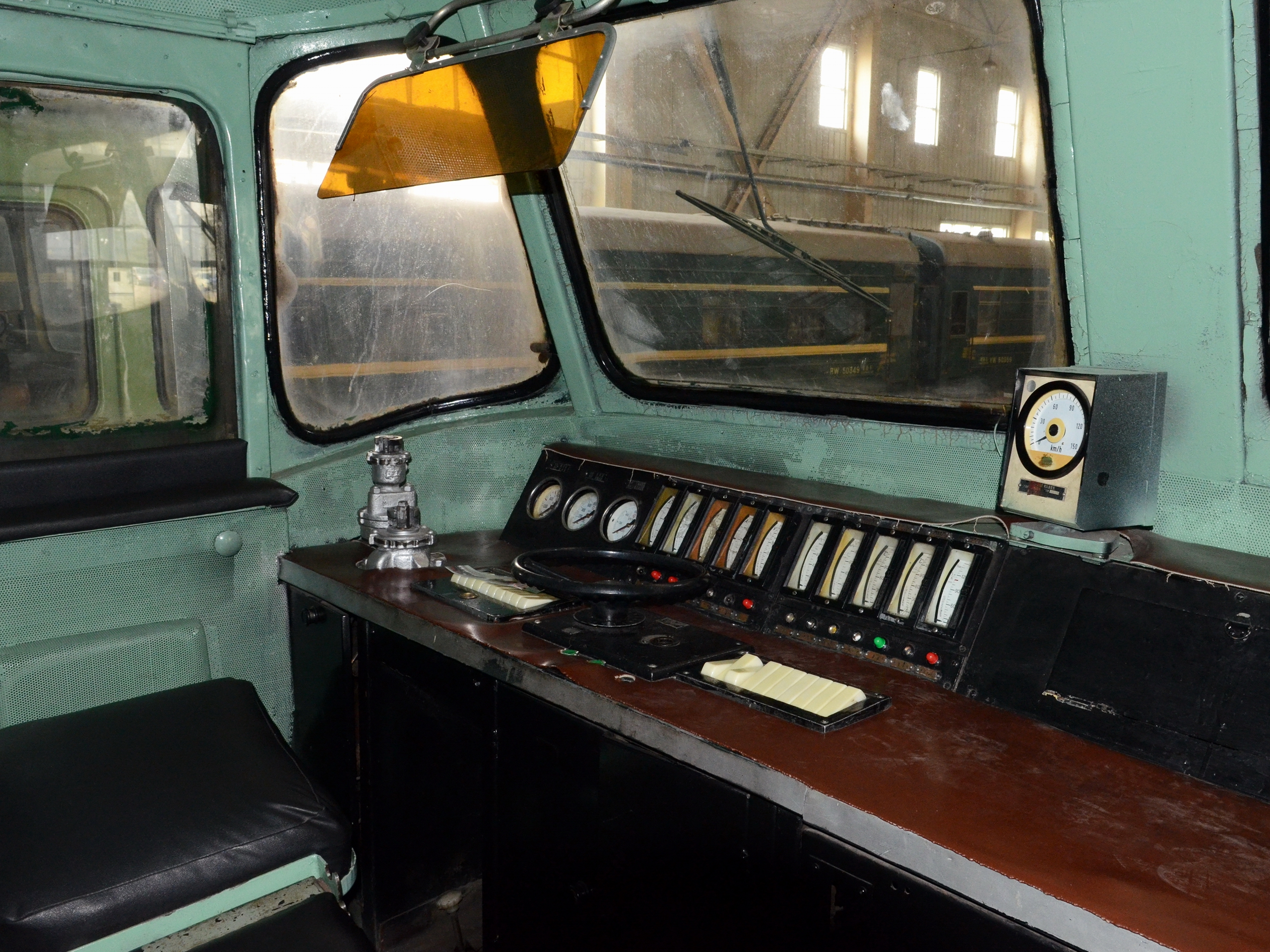 中文（中国大陆）: 保存在中国铁道博物馆的东风4型0001号车的驾驶室